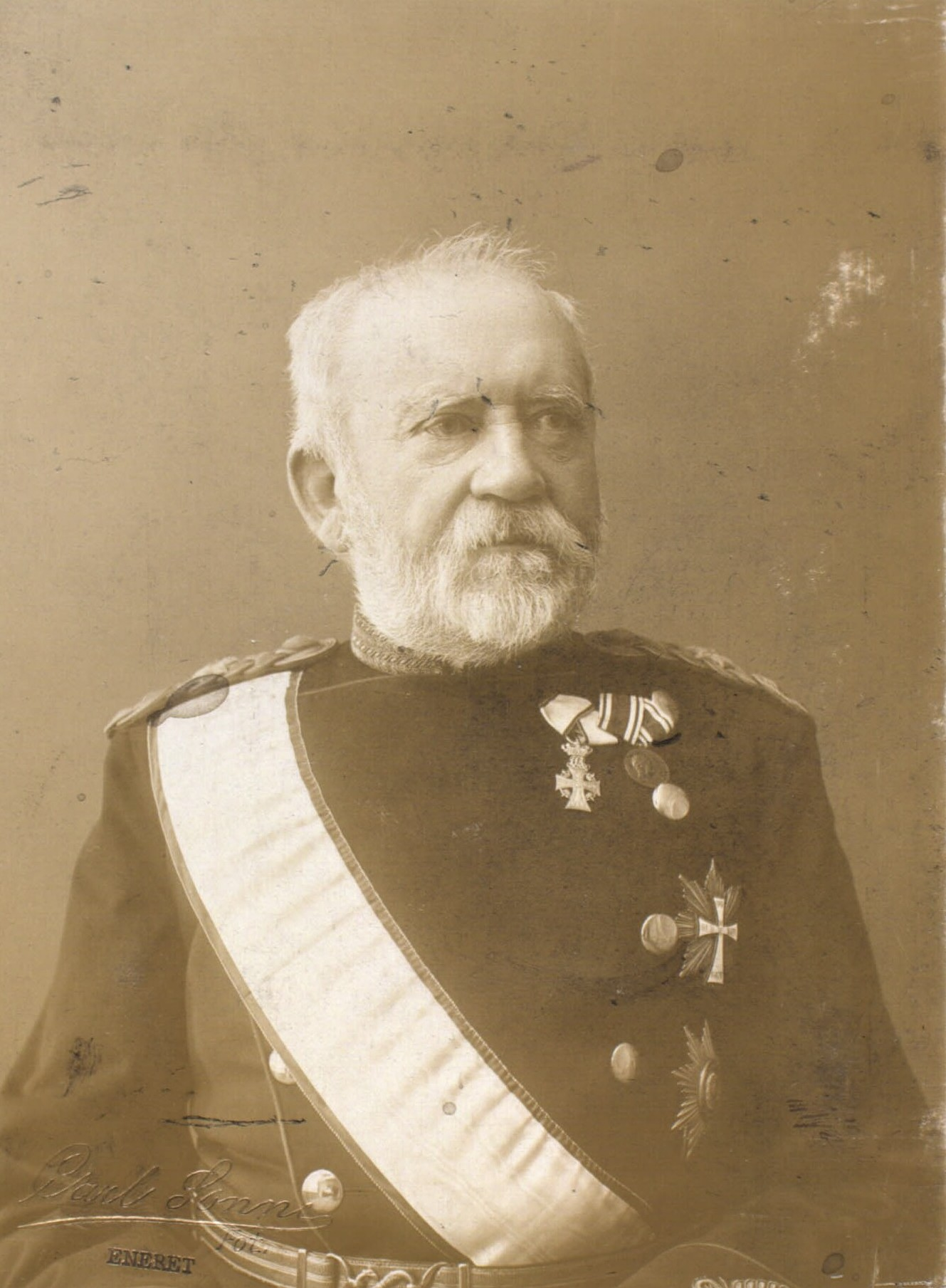 Johan Linnemann (1826-1906), Danish general